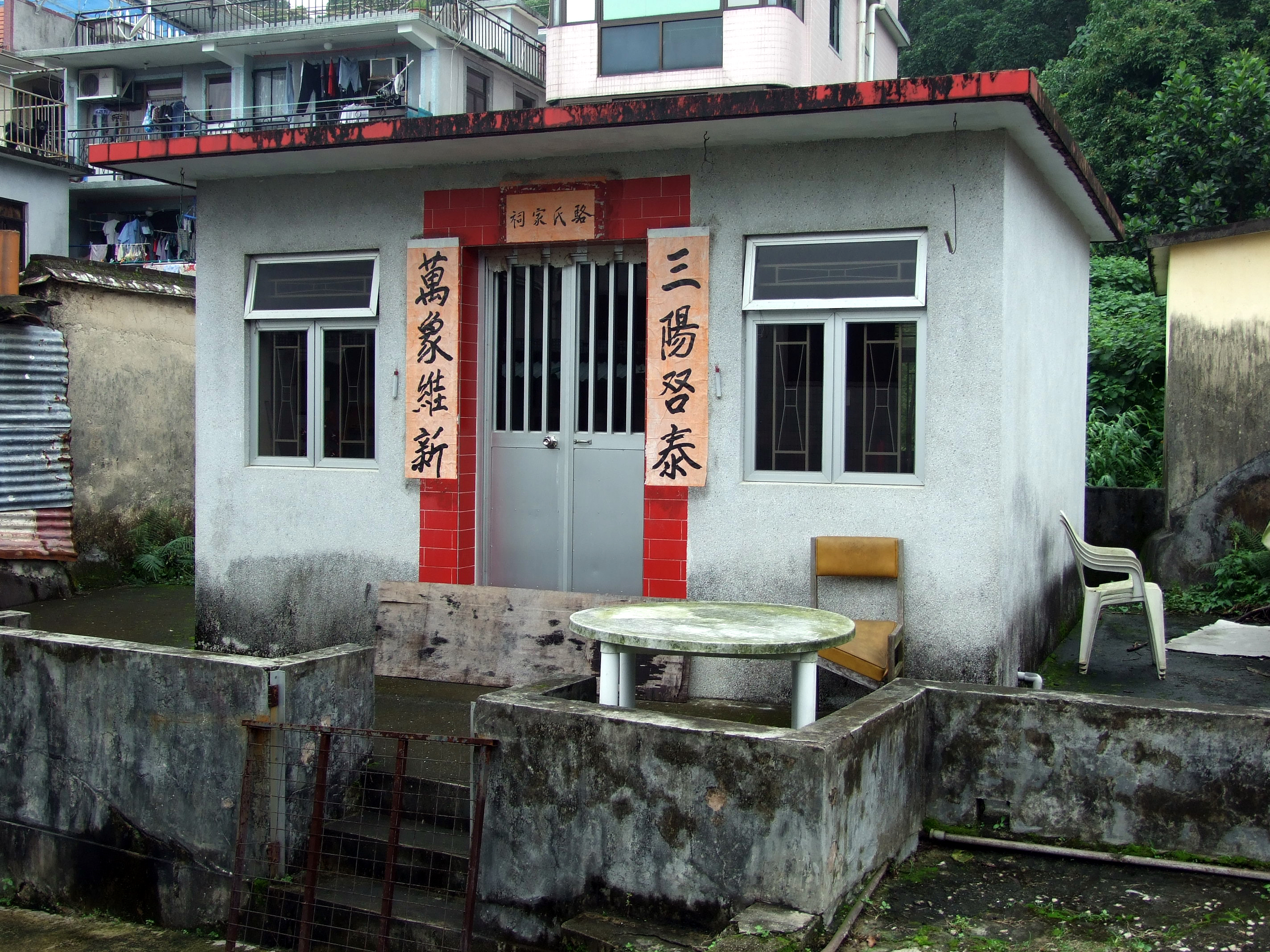 中文（香港）: 北港村駱氏家祠